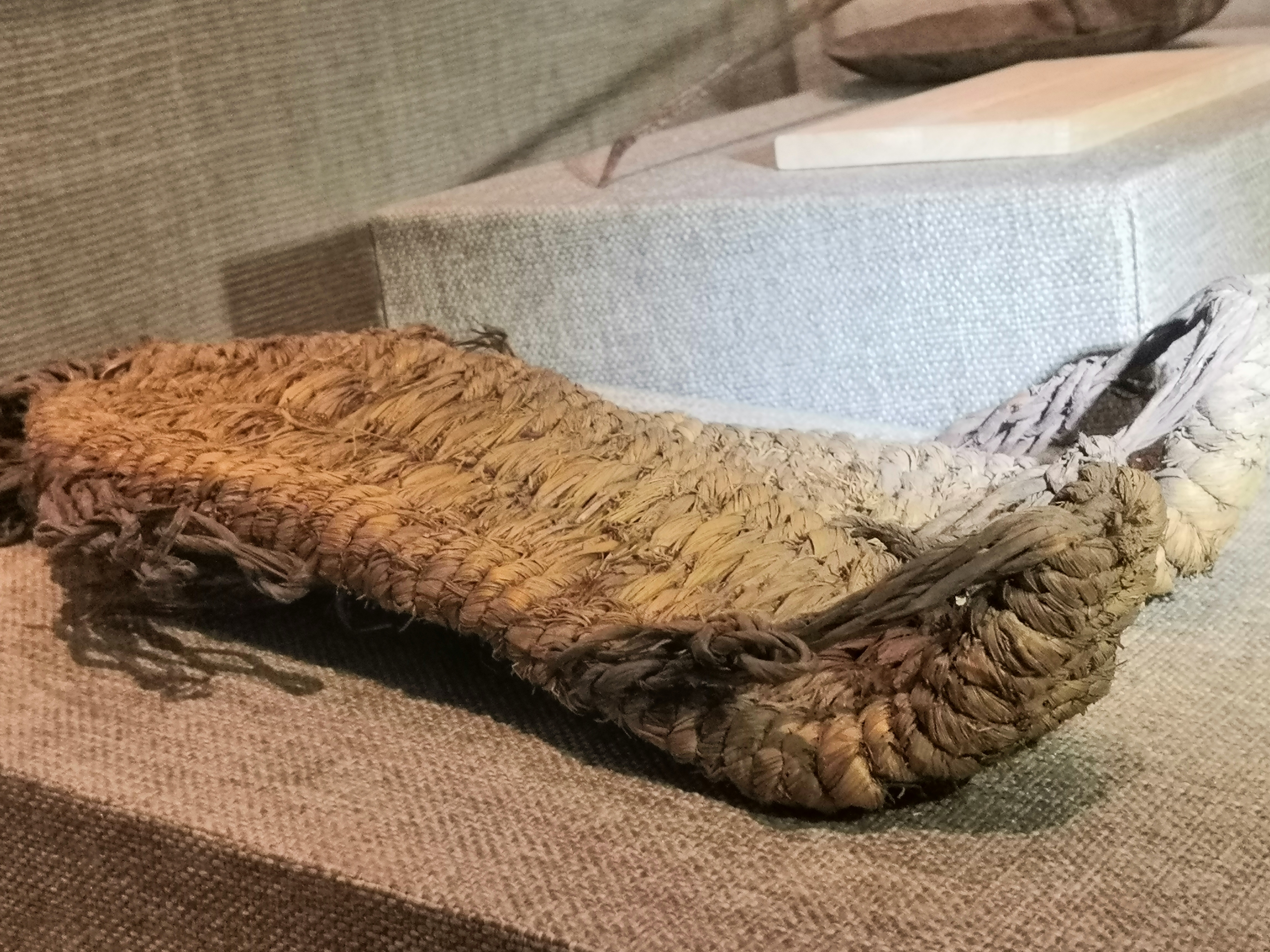 中文（中国大陆）: 三年游击战时期 红军游击队员 穿过的草鞋